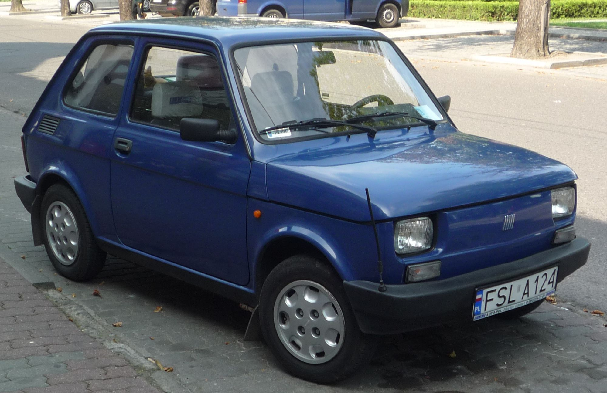 Fiat 126 Maluch Town w Słubicach.